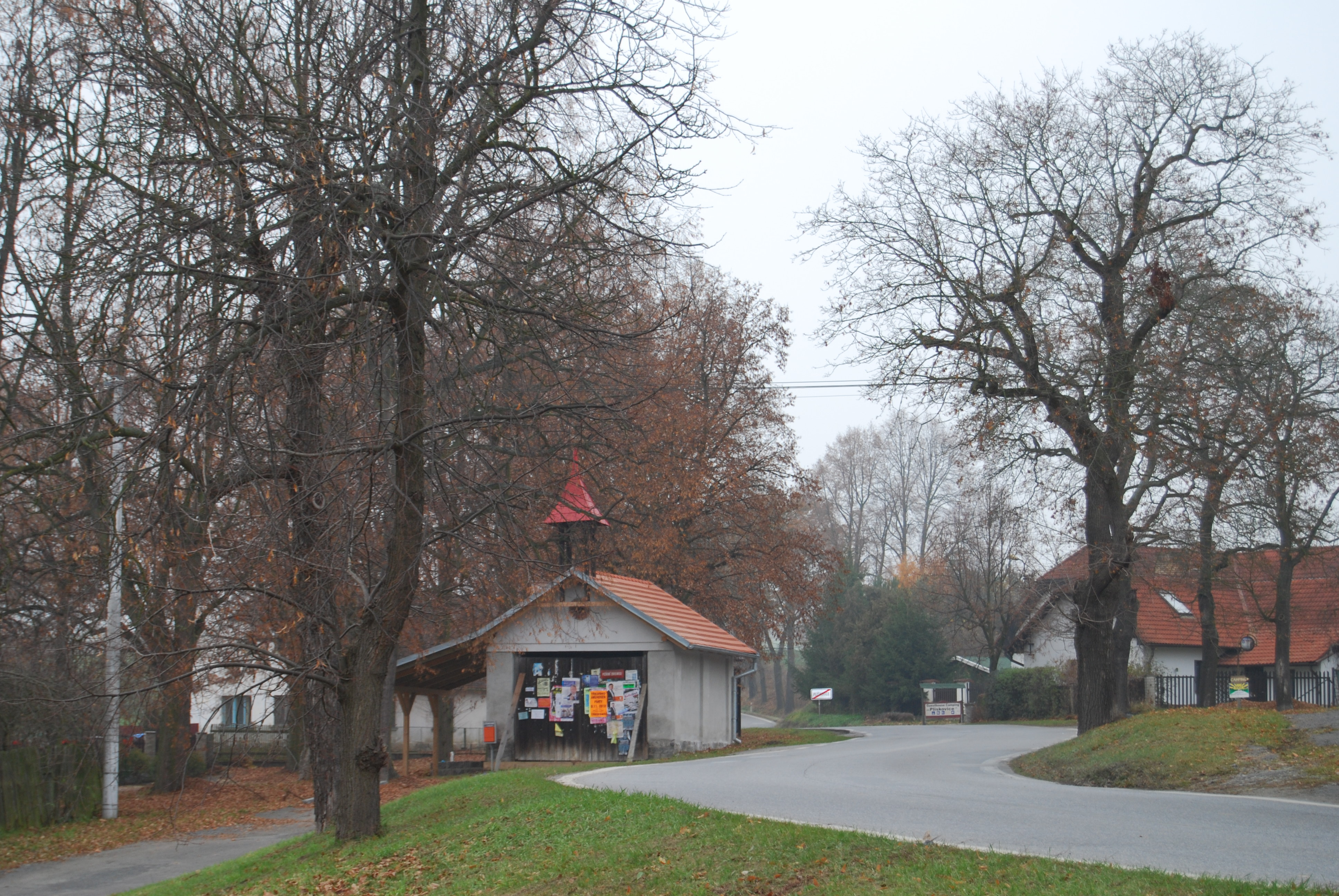 Pohled na část obce. Plíškovice je část města Mirovice v okrese Písek. Česká republika.